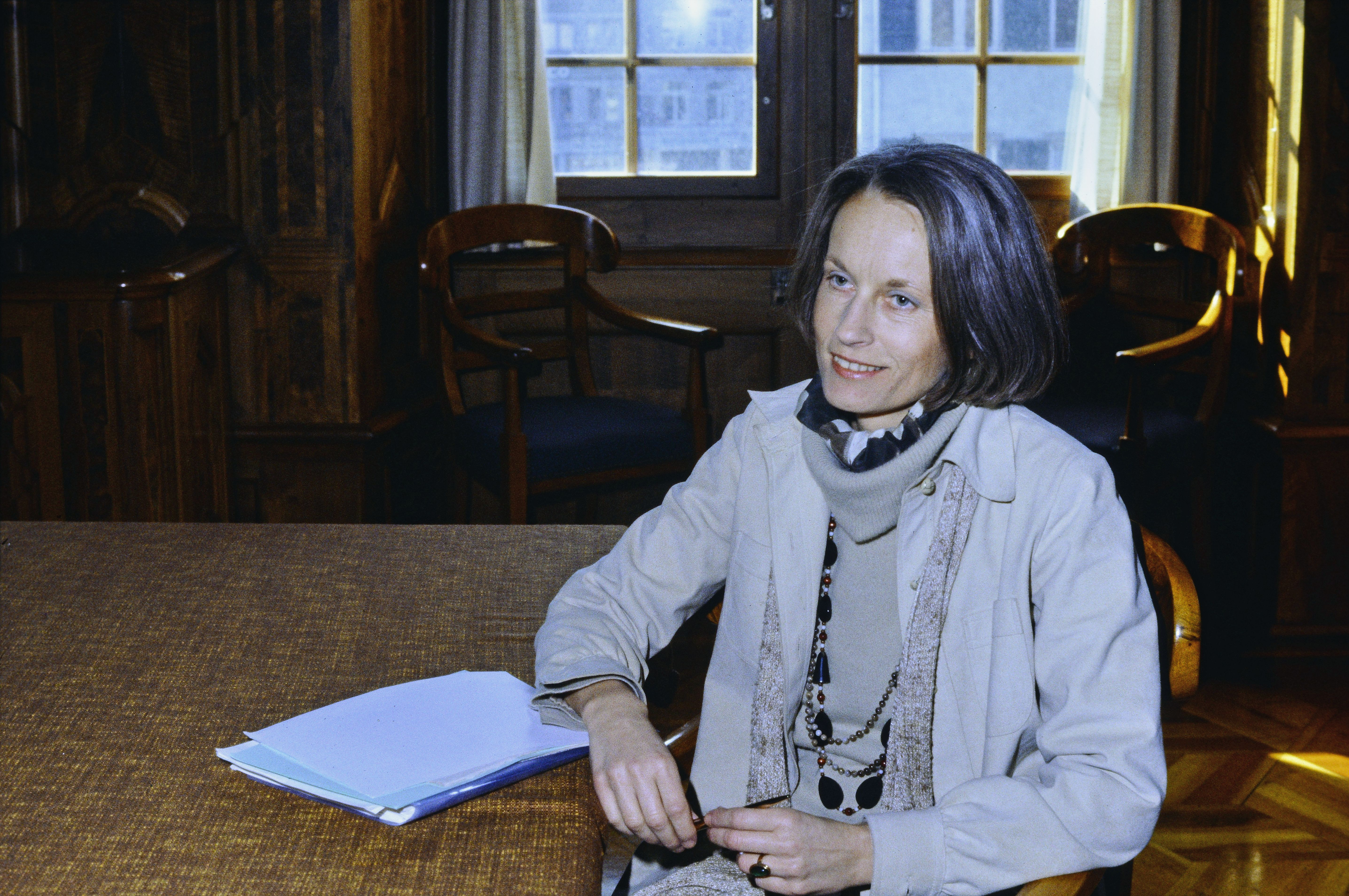 Porträt Verena Grendelmeier